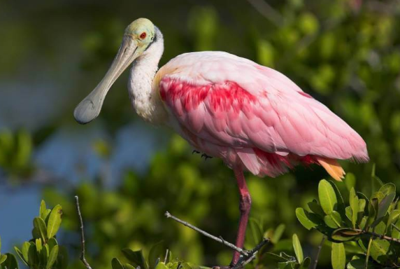 BIRDS